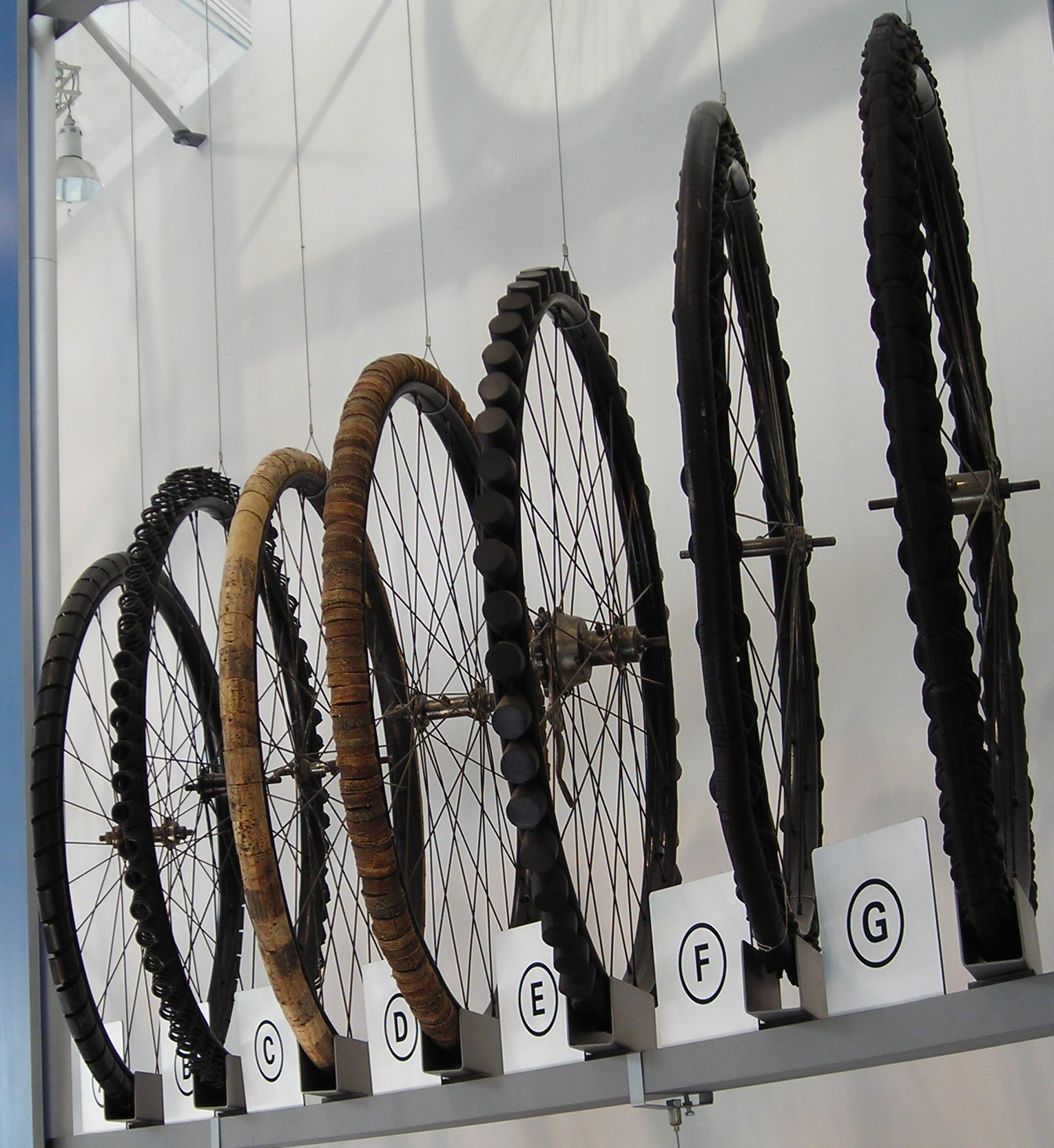 Historische Fahrrad-Notbereifungen in (Nach-)Kriegszeiten mit Gummiknappheit A: Reifen aus wendelförmig gewundenem Stahlblech (1916-1919) B: Rad mit Schraubenfederbereifung (1916-1919) C: Rad mit Korkscheibenauflage (um 1945) D: Rad mit Gummischeiben (um 1945) E: Rad mit Gummi-Muffenauflage (um 1945) F: Rad mit Federn und Vollgummireifen (um 1945) G: Reifen mit Federn und Vollgummibelag (um 1945) (Text der Erklärung: Deutsches Museum Verkehrszentrum) Exponate im Deutschen Museum Verkehrszentrum München, Halle III, EG